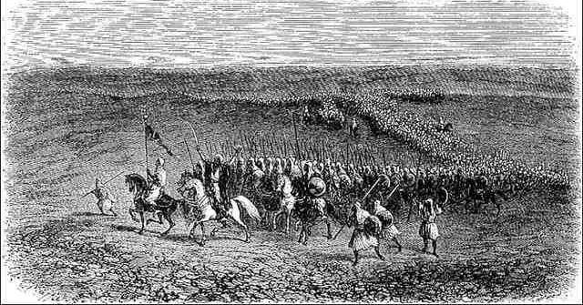 Armée de la Régence d'Alger, Béni Abbès et Koukou en campagne vers oran.